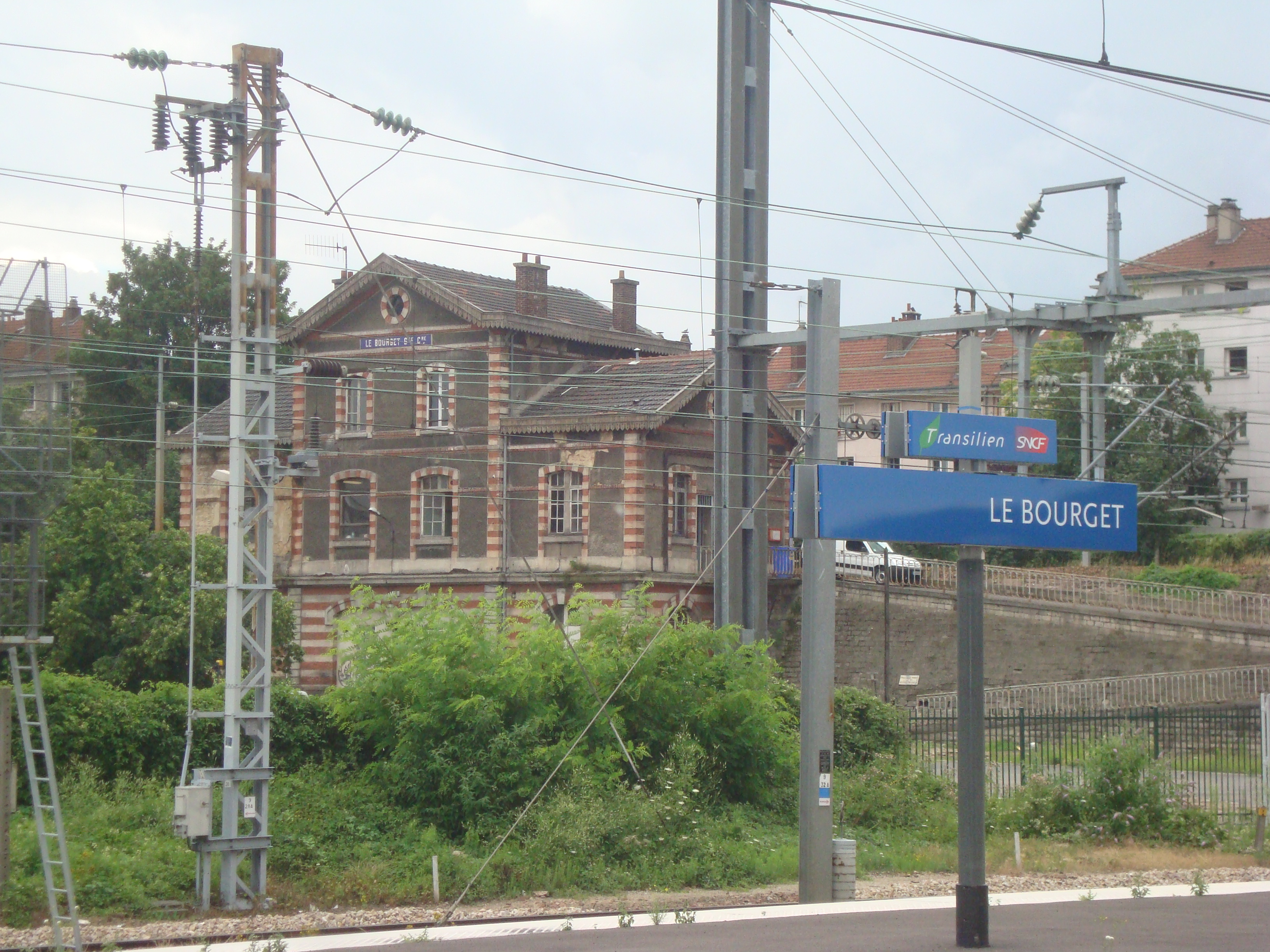 Gare du Bourget de la Grande ceinture, future Tangentielle Nord.